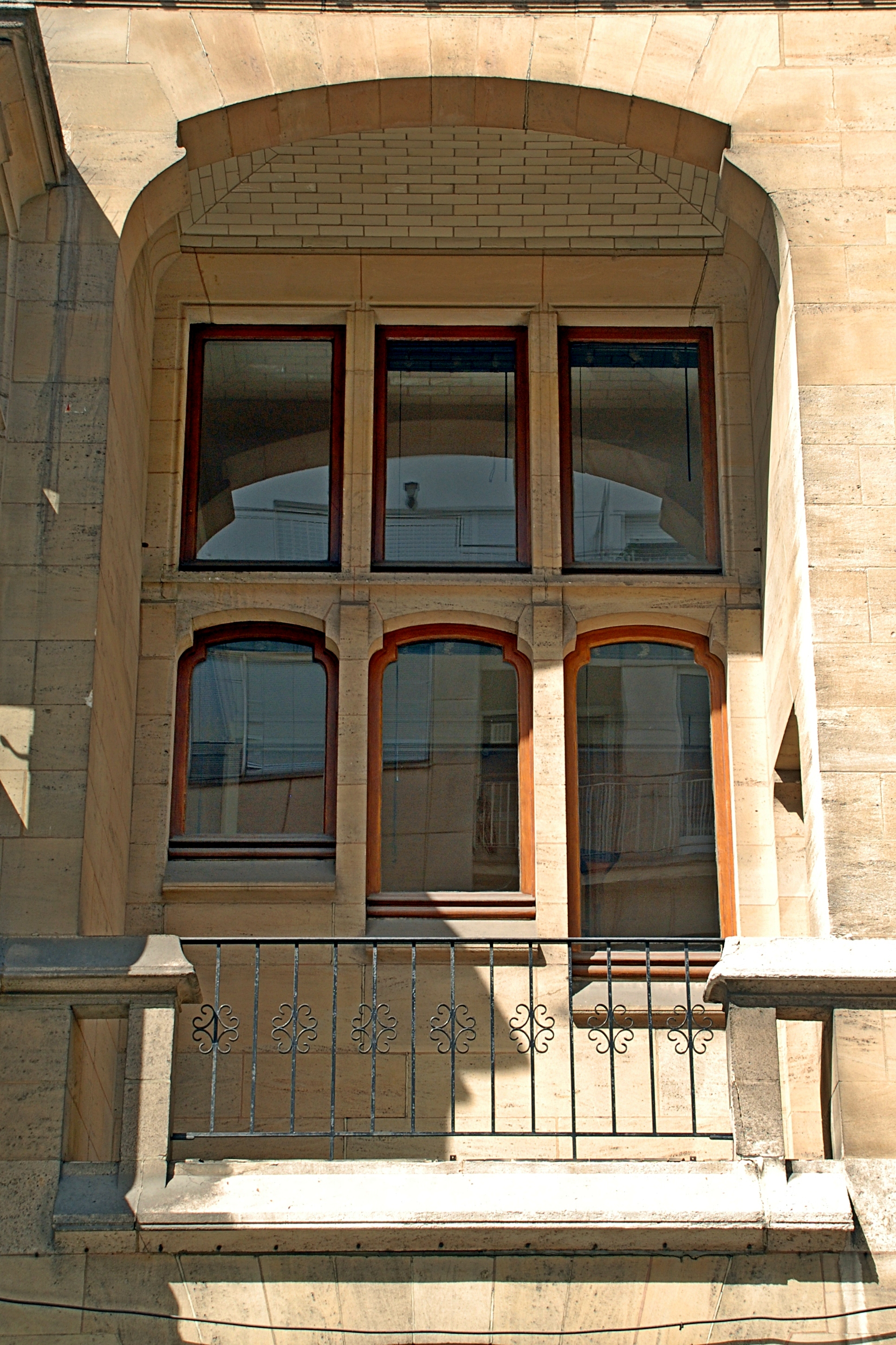 Belgique - Bruxelles - Hôtel Otlet